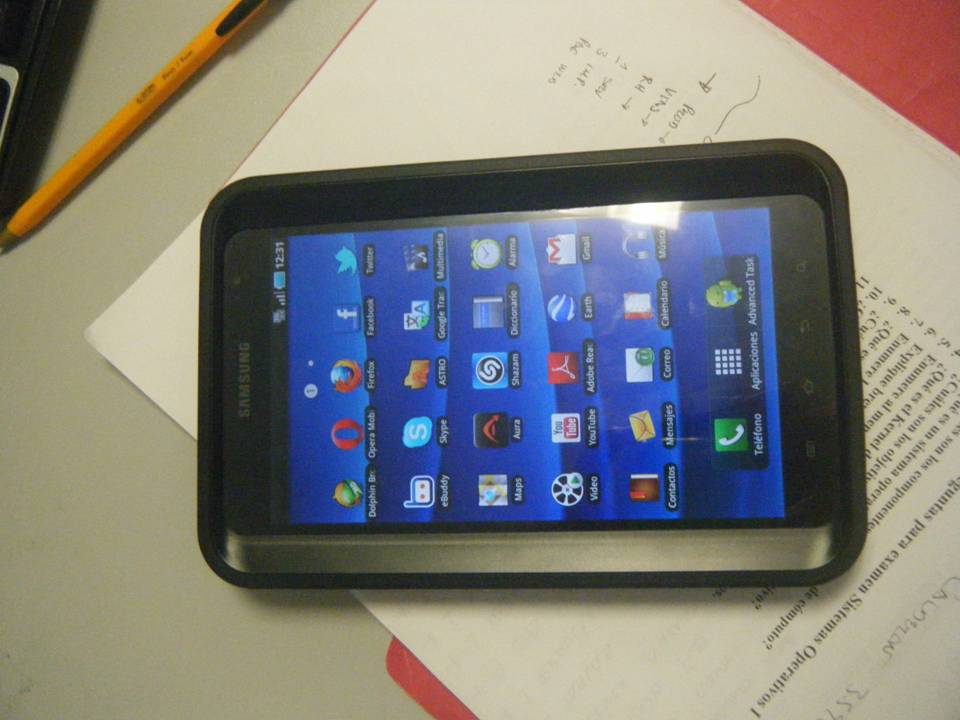 es una foto de una tablet Samsung